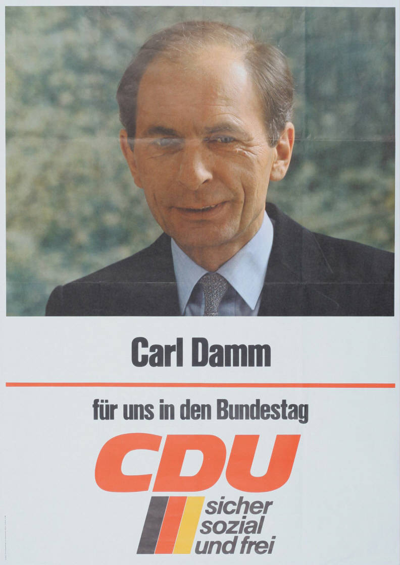 Carl Damm für uns in den Bundestag CDU sicher sozial und frei Abbildung: Porträtfoto Plakatart: Kandidaten-/Personenplakat mit Porträt Auftraggeber: CDU-Bundesgeschäftsstelle, Abt. Öffentlichkeitsarbeit, Bonn Objekt-Signatur: 10-001: 2395 Bestand: Plakate zu Bundestagswahlen (10-001) GliederungBestand10-18: Plakate zu Bundestagswahlen (10-001) » Die 9. Bundestagswahl am 5. Oktober 1980 » CDU » Mit Porträtfoto Lizenz: KAS/ACDP 10-001: 2395 CC-BY-SA 3.0 DE